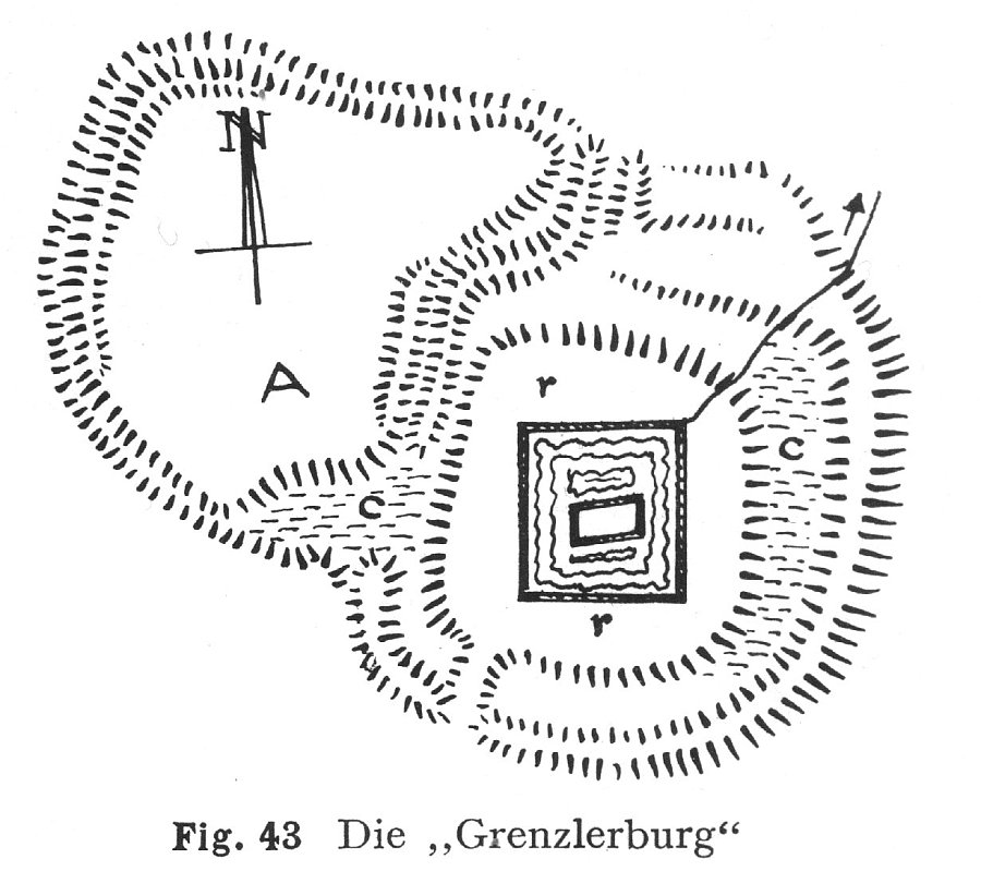 Grenzlerburg bei Othfresen